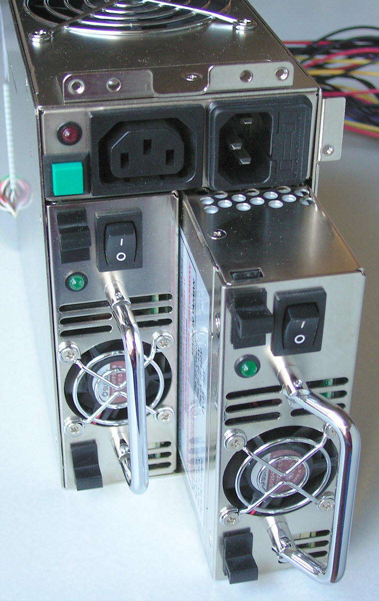 Ein redundantes PC-Netzteil zur Montage in einem 19"-Gehäuse, einer der beiden Einschübe halb herausgezogen. Die Baugröße entspricht einem Standard-ATX-Netzteil